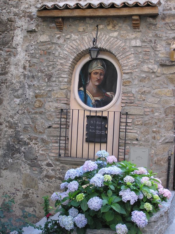 S. Liborio di Le Mans - Edicola votiva dove sorgeva la Chiesa dedicata al Santo francese (Foto di Luigino C.)